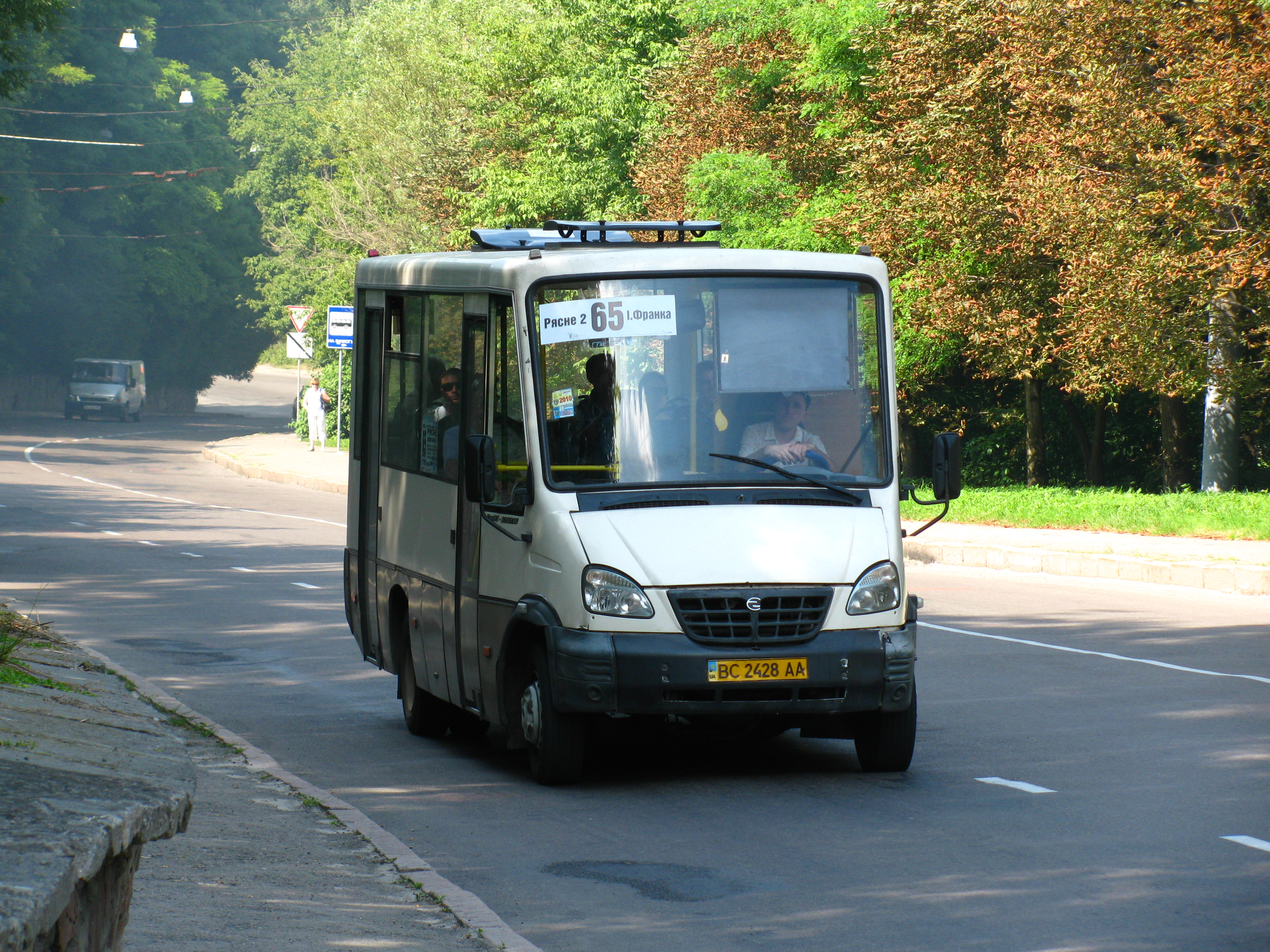 автобус ГалАЗ-3207 (Вікторія) на вулиці Литвиненка у Львові